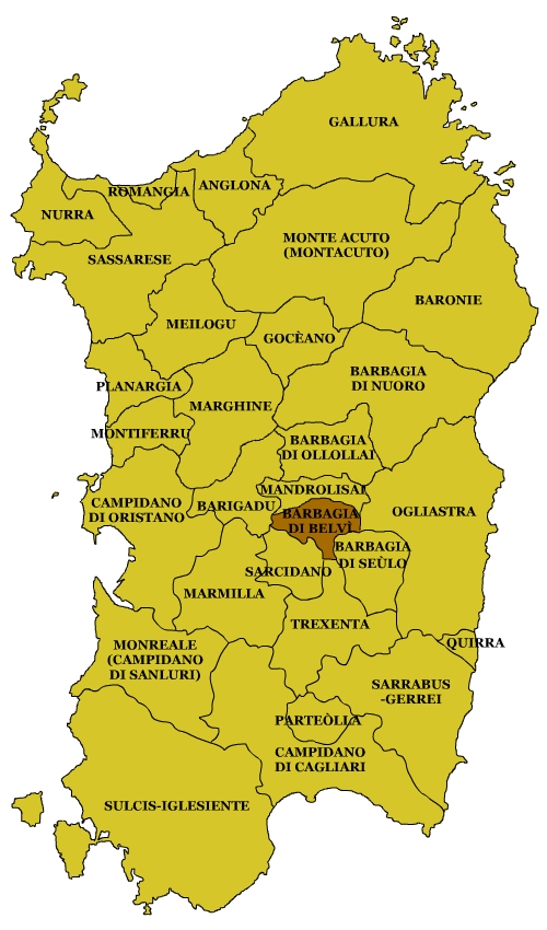 Sardinian Subregions